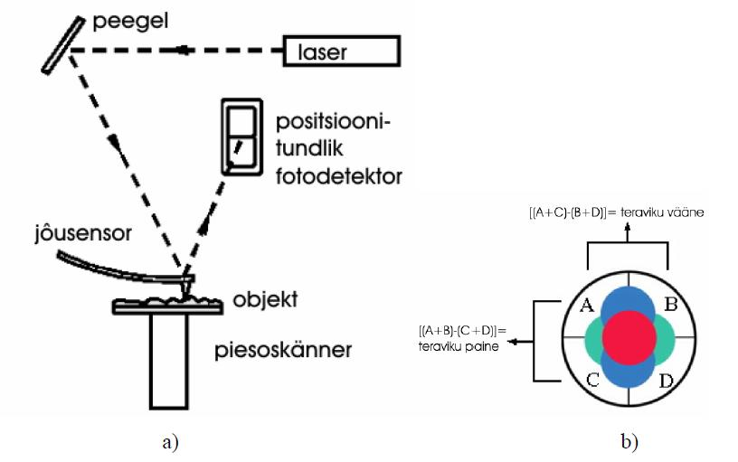 Vedrukese paine